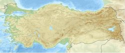 Göbekli Tepe, მხარე თანამედროვე თურქეთში, თარიღდება ძვ.წ. 9000 წლით, არის ნაყოფიერი ნახევარმთვარის ნაწილი